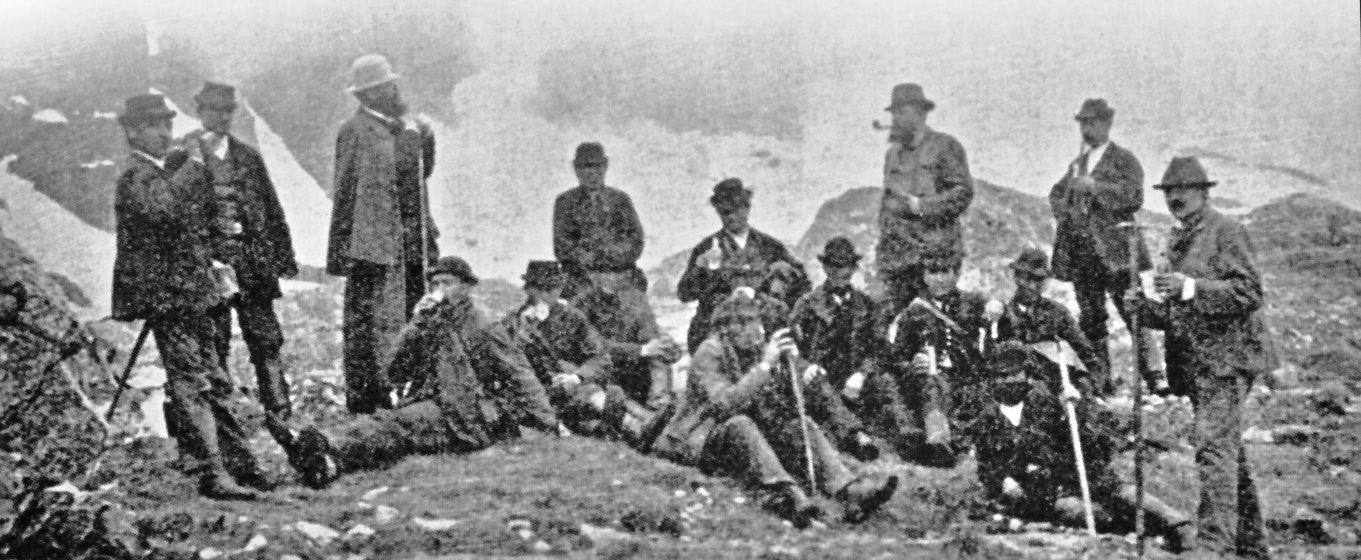 Komisia Uhorského karpatského spolku vyberala miesto pre stavbu chata ( Téryho chaty) v Malej Studenej doline vo Vysokých Tatrách